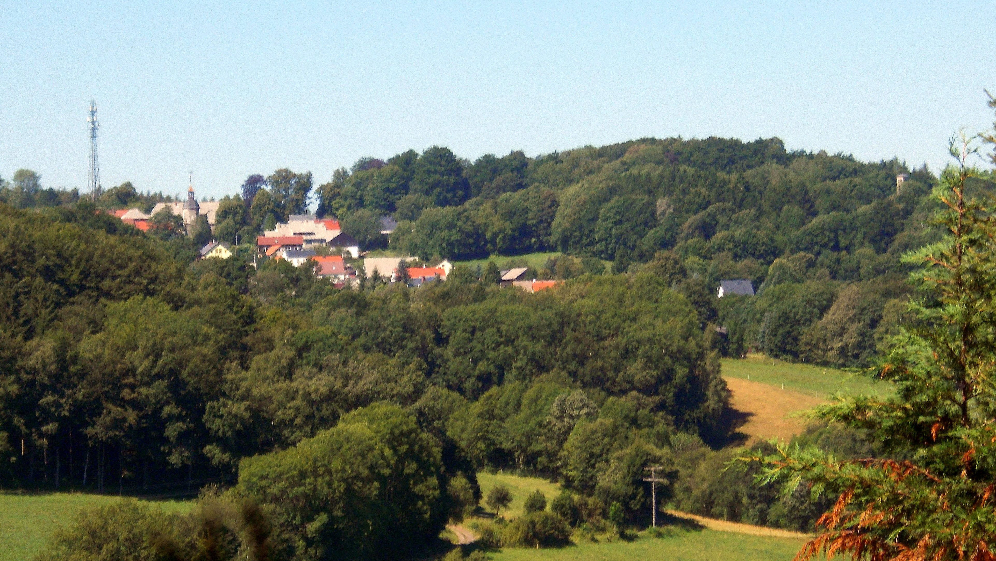 Blick vom Schmiedeberger Bauverein auf den Schmiedeberger Ortsteil Naundorf mit Funkmast, Schloßturm und Aussichtsturm "Otto's Eck".